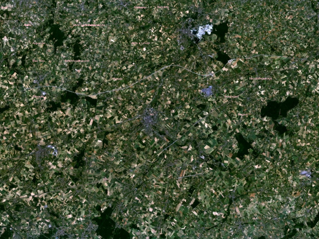 Ath vue d'un satellite